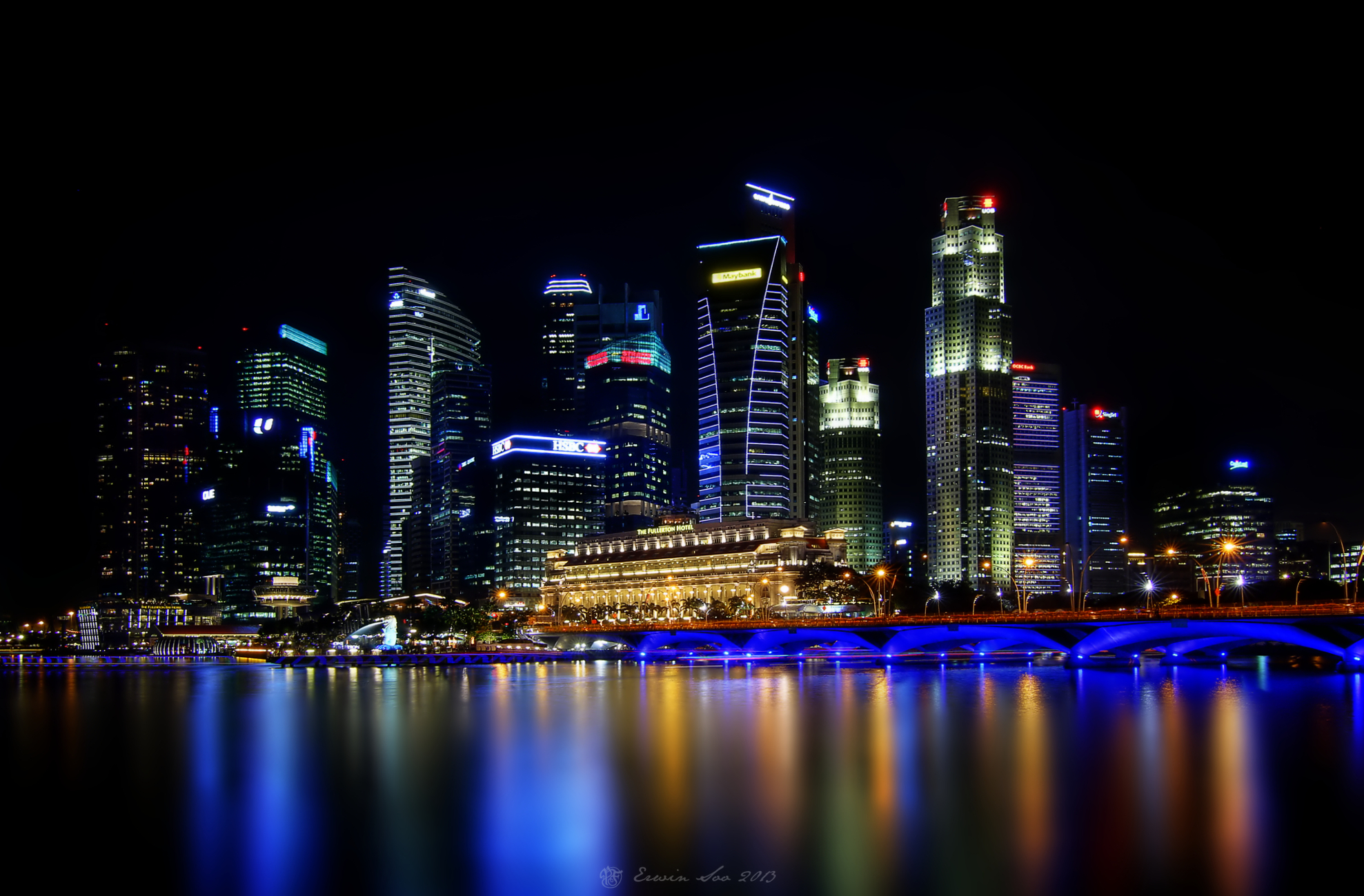 Singapore Skyline 5